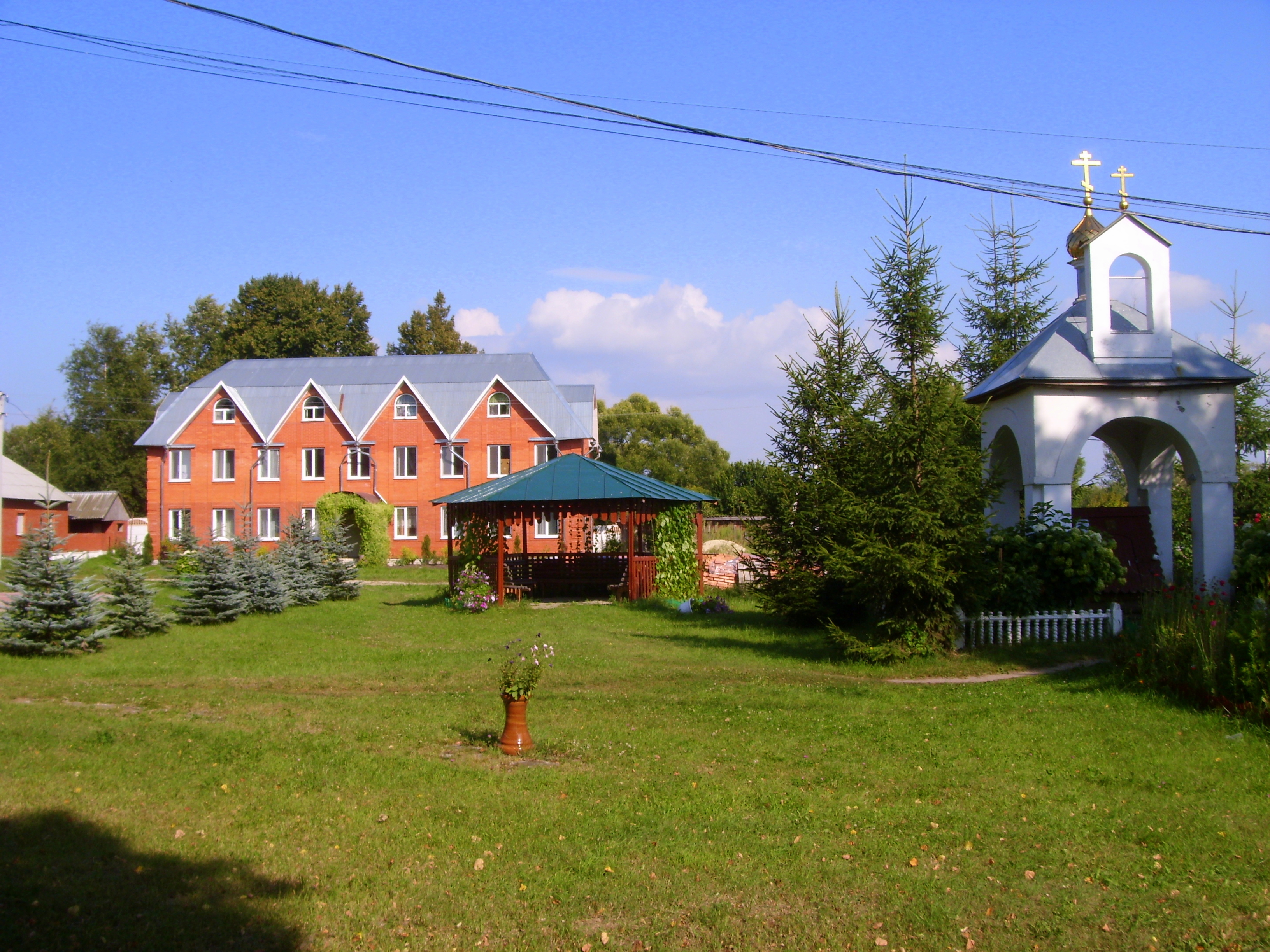 Одрин-Николаевский монастырь (Брянская область, Карачев, д. Одрин)